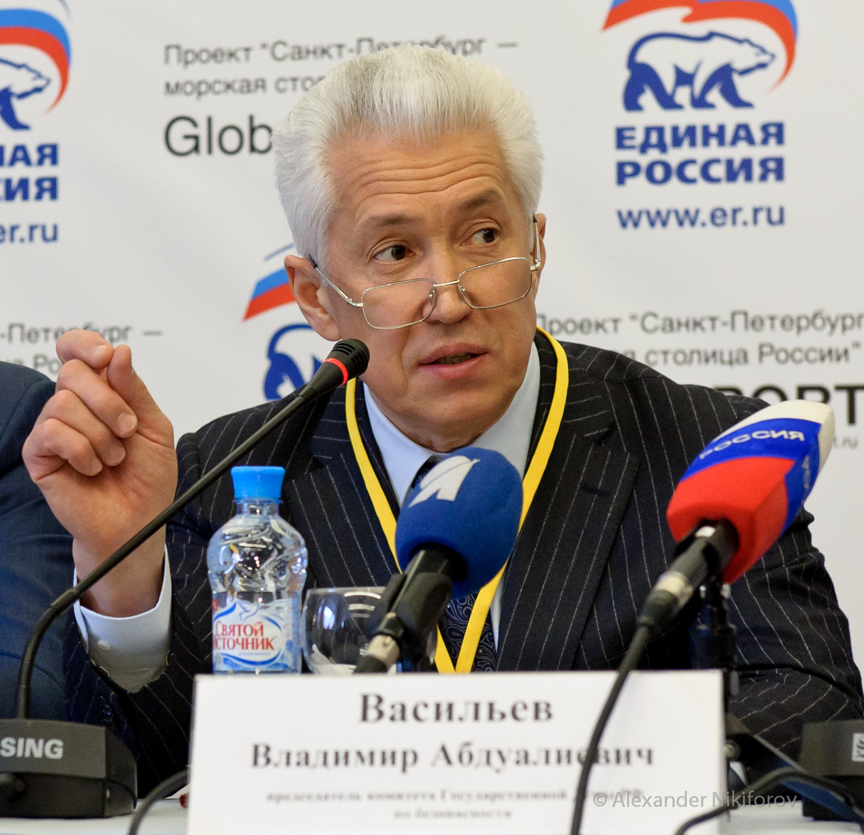 Васильев, Владимир Абдуалиевич — российский государственный деятель